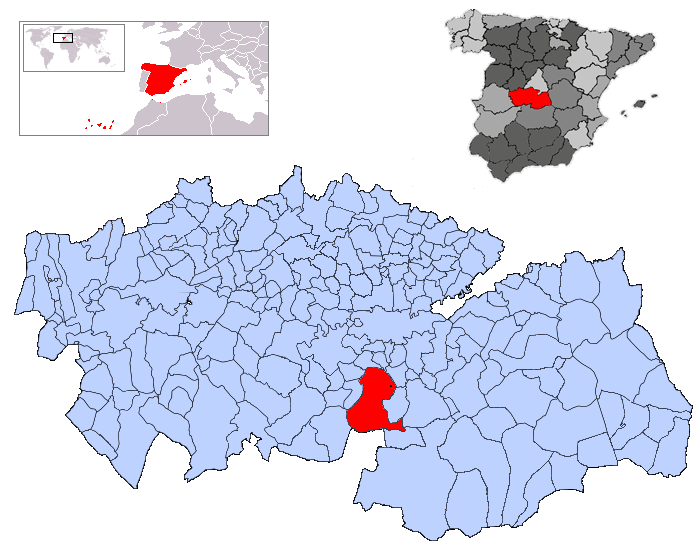 Mazarambroz en la provincia de Toledo